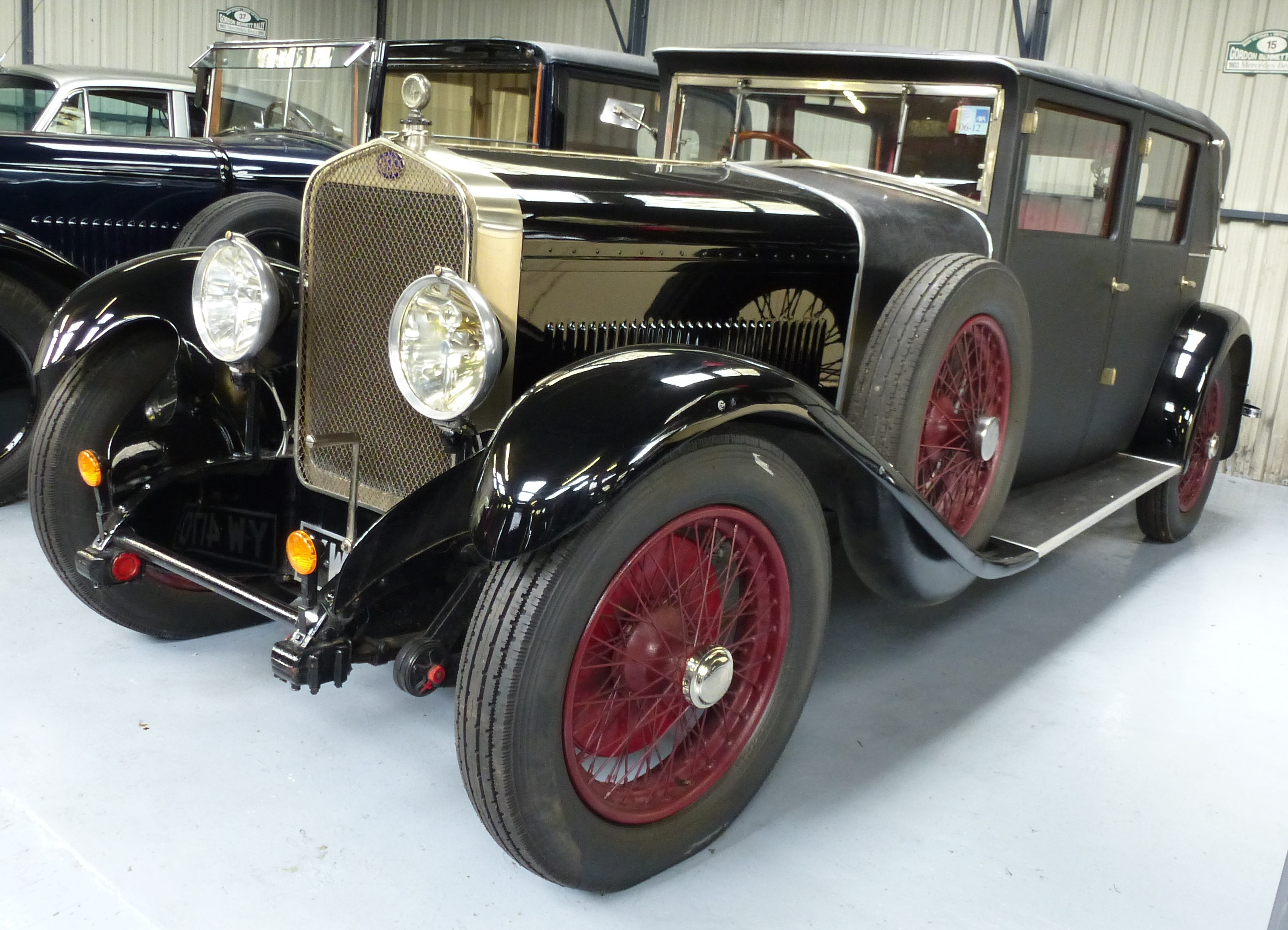 Delage DM 4 1928